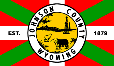 Johnson konderriko bandera, EHko ikurrinan oinarritua